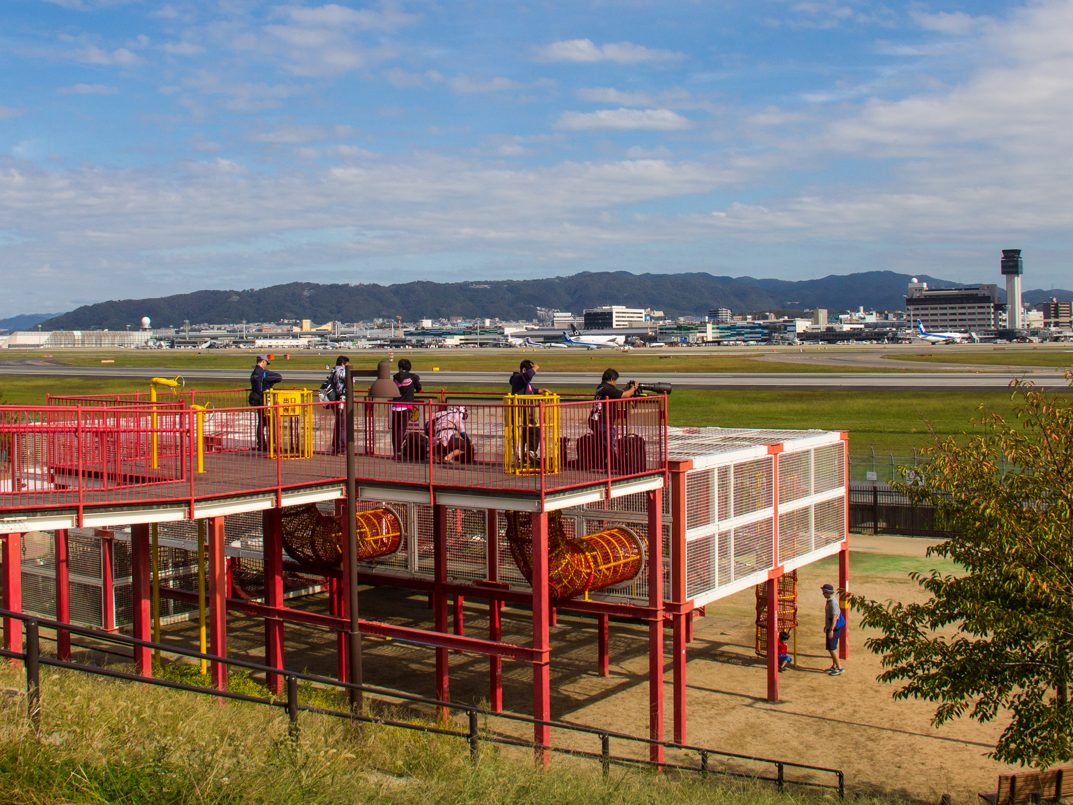 伊丹スカイパーク 冒険の丘 キューブアドベンチャー